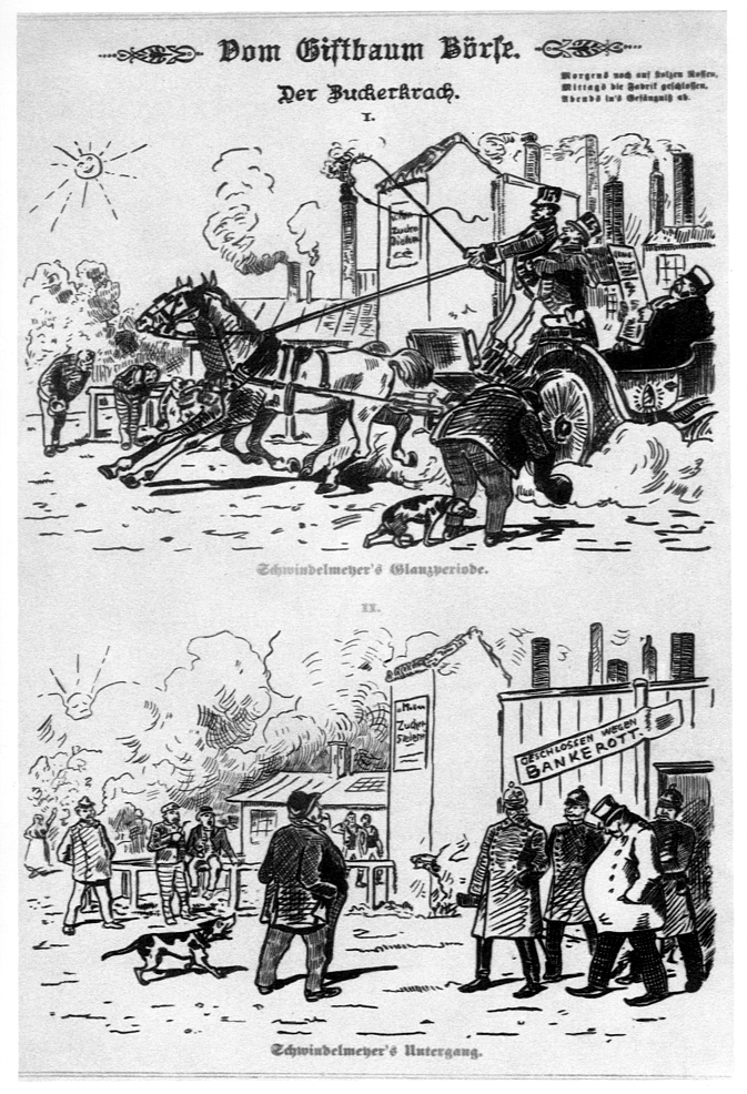 Karikatur zum Zuckerkrach von 1889, Titel: Vom Giftbaum Börse, Der Zuckerkrach